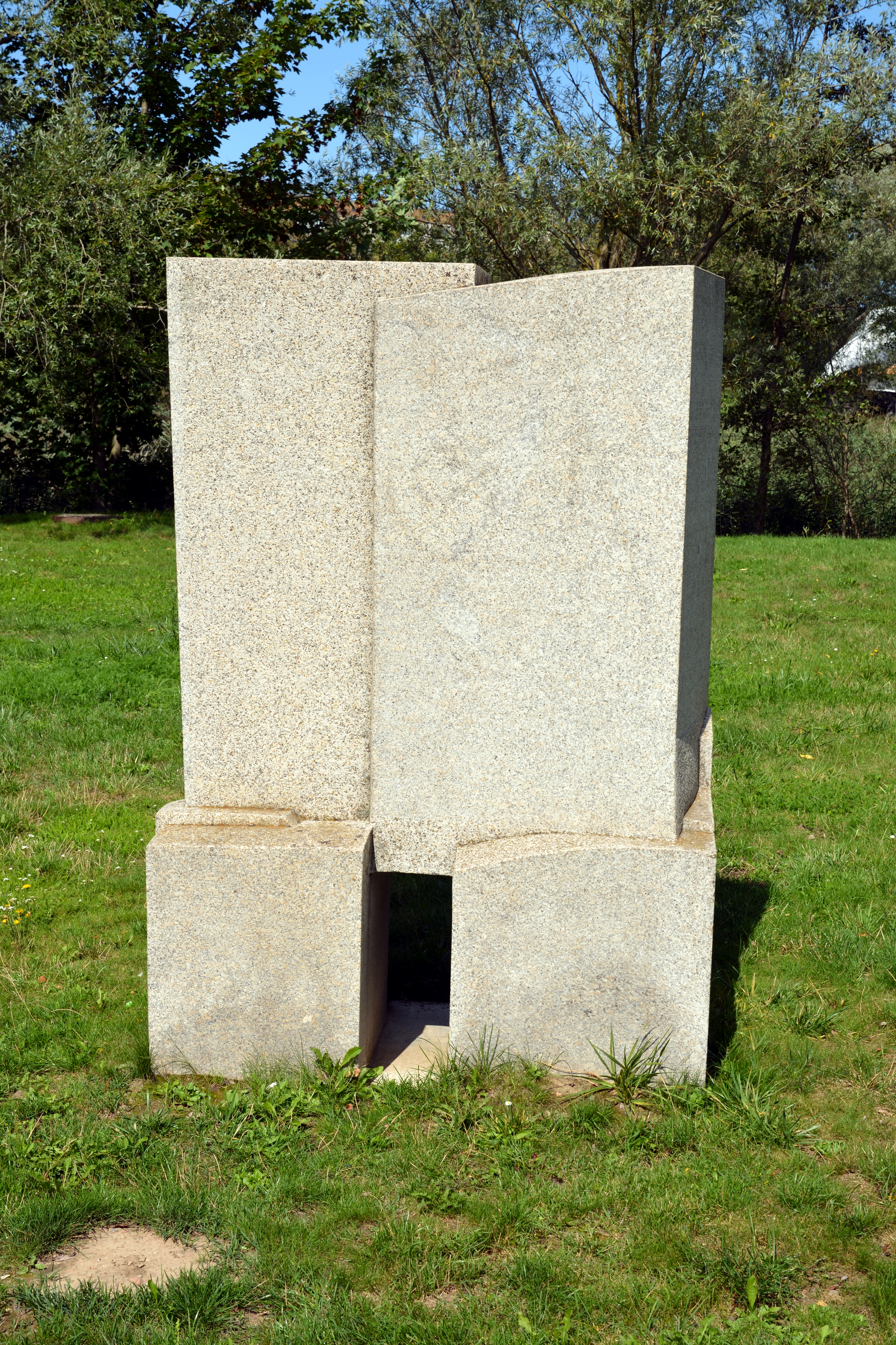 Die Skulptur "Begegnung" von Anne Sewcz im IGA-Park in Rostock.